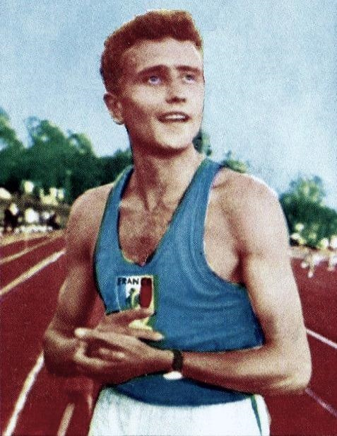 Michel Jazy en 1966 - Campioni dello Sport 1966-1967, n°47